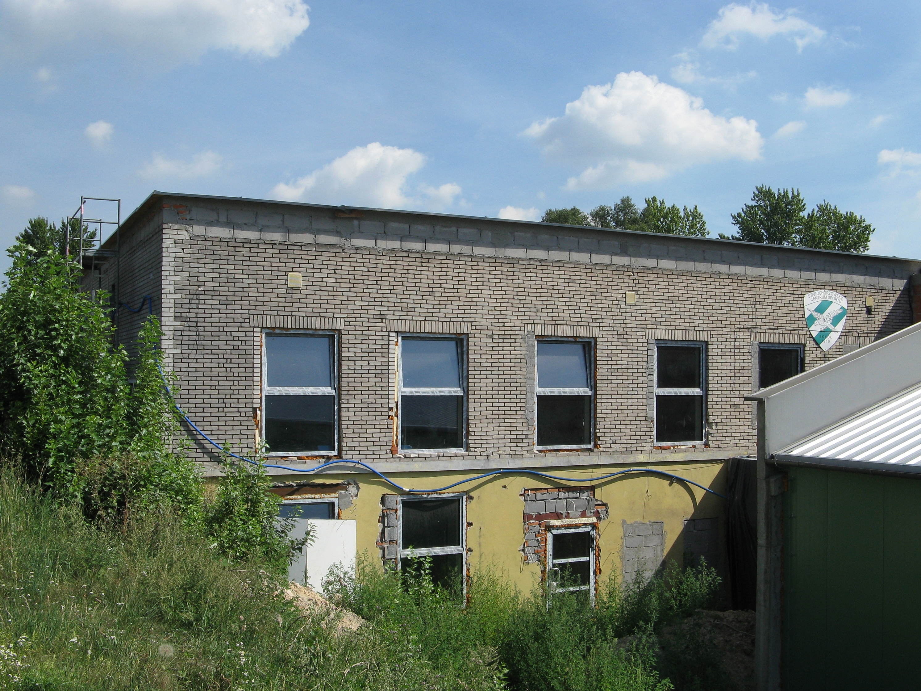 Budynek Starochorzowskiego Centrum Sportu Sokół, ul. Harcerska 1 w Chorzowie.